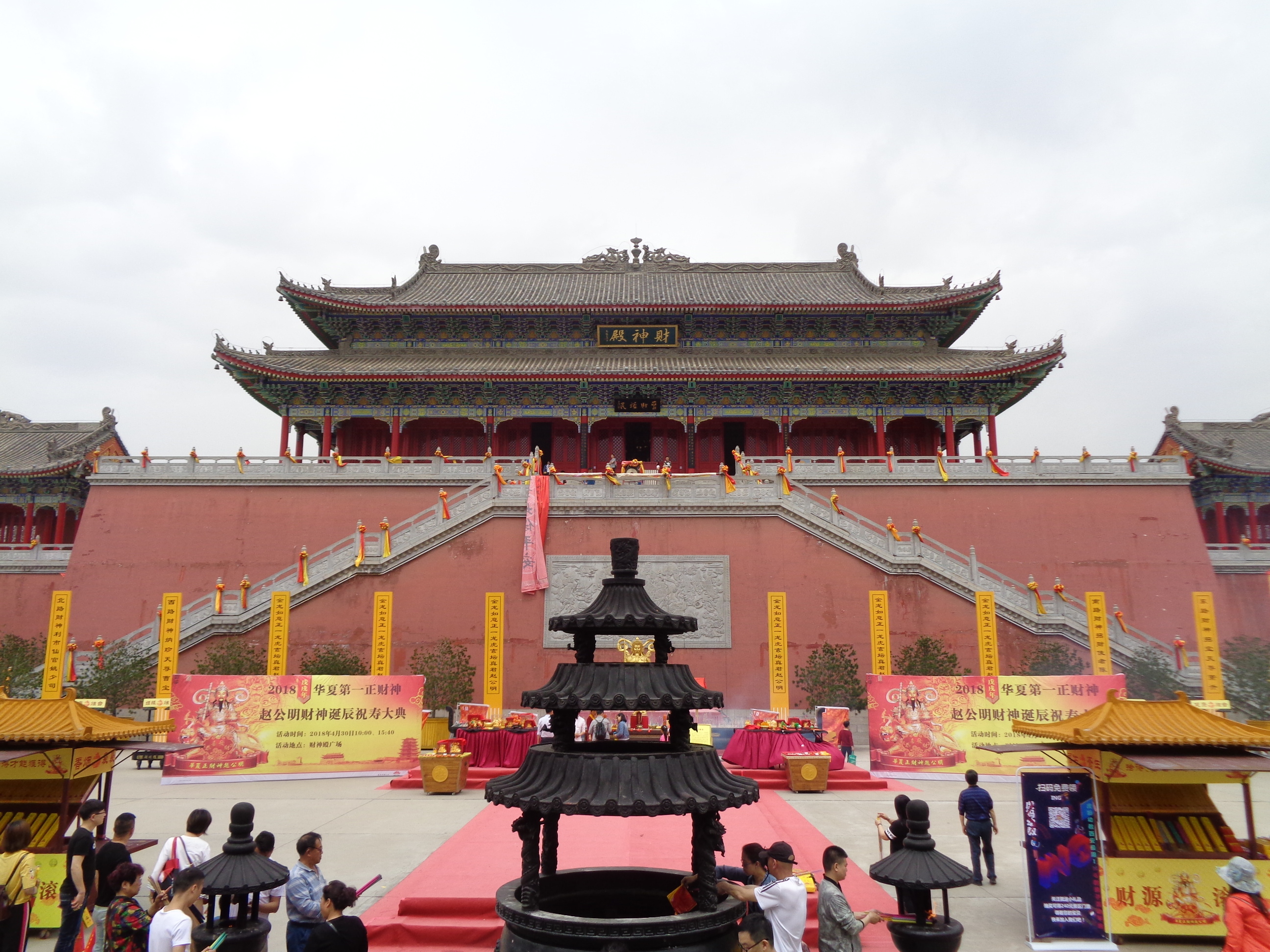 西安市周至县107省道 近郊楼观台